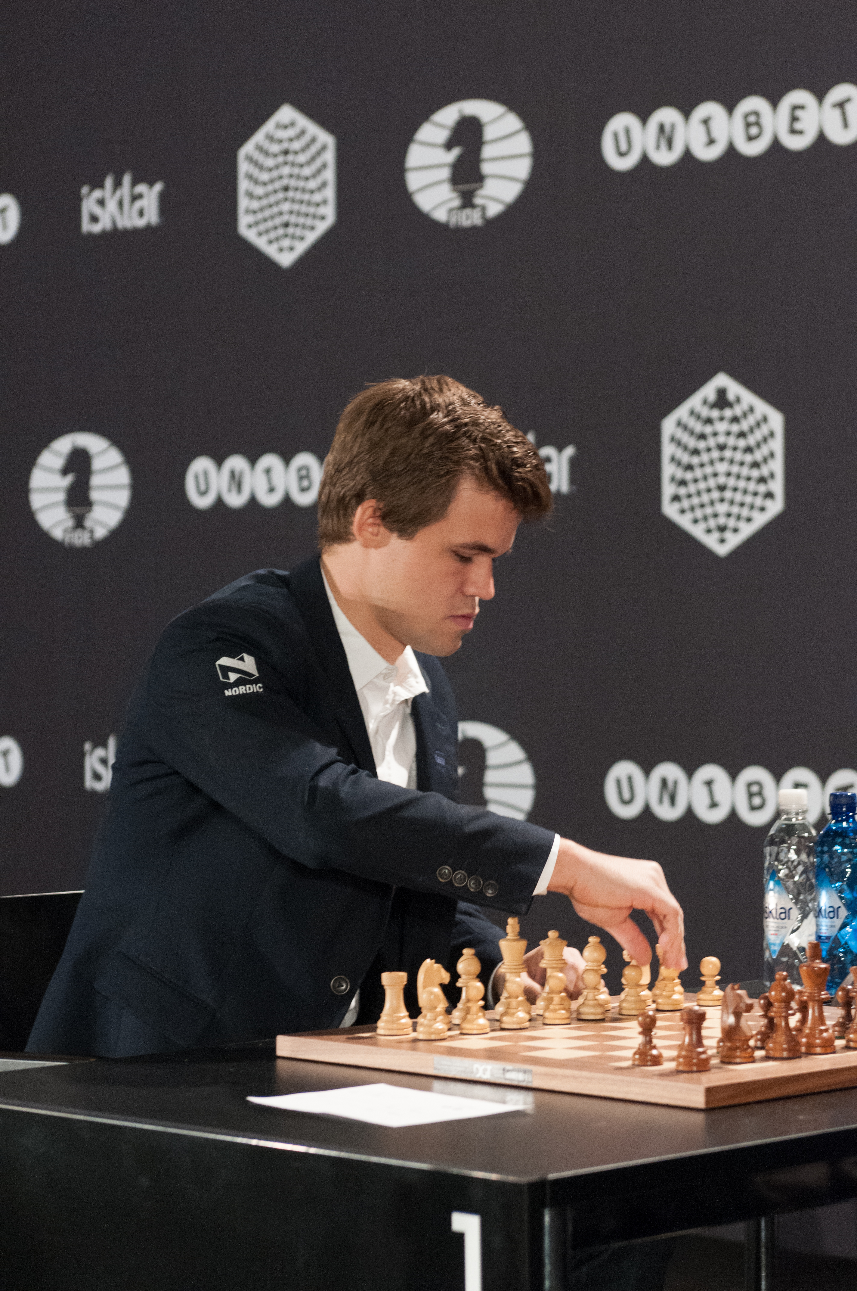 Schnell- und Blitzschachweltmeisterschaften 2015 in Berlin